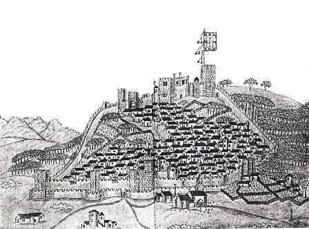 Cidade de Castelo Branco há muito tempo atrás.